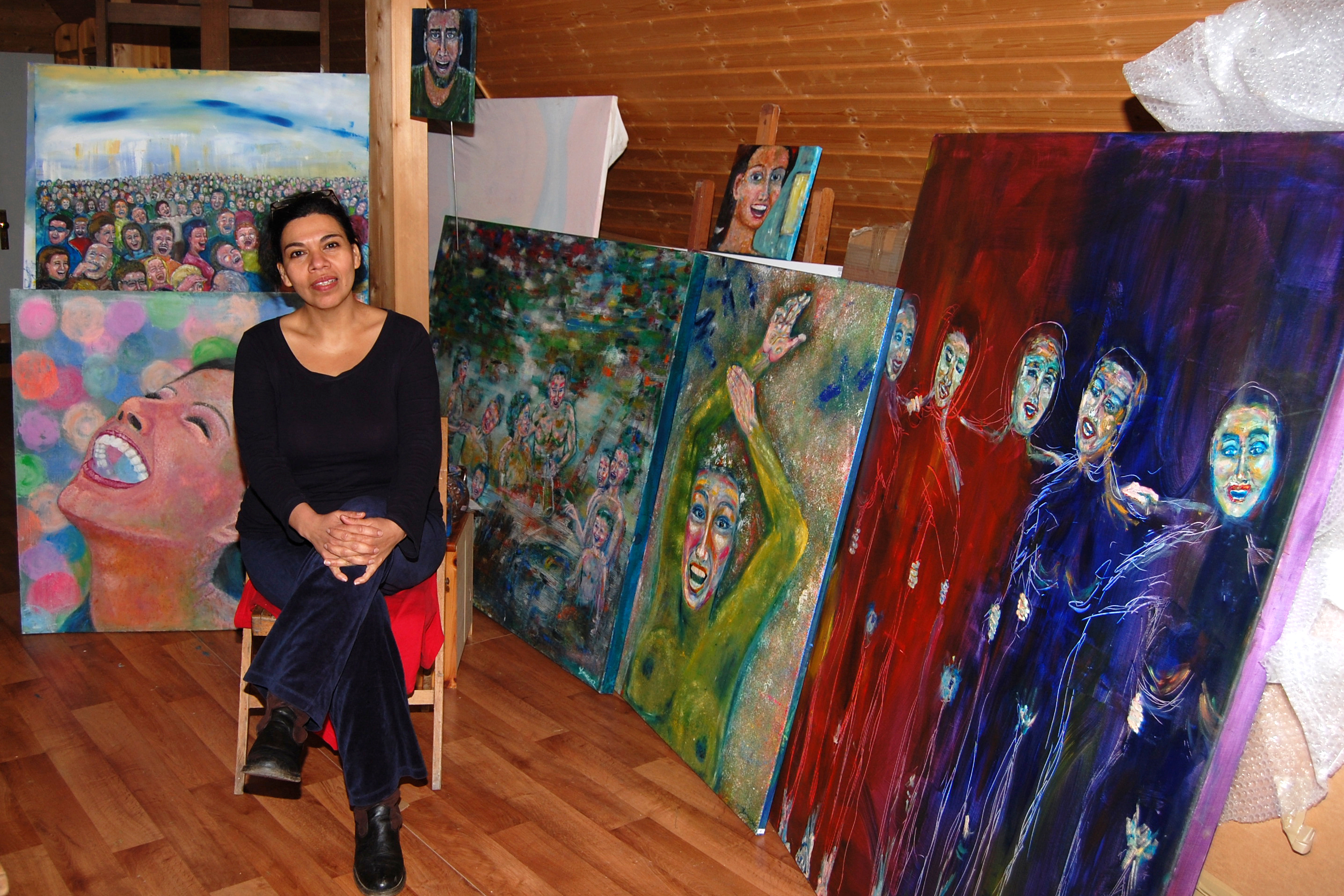 Verónica Ibsel Domínguez - Taller con la risa